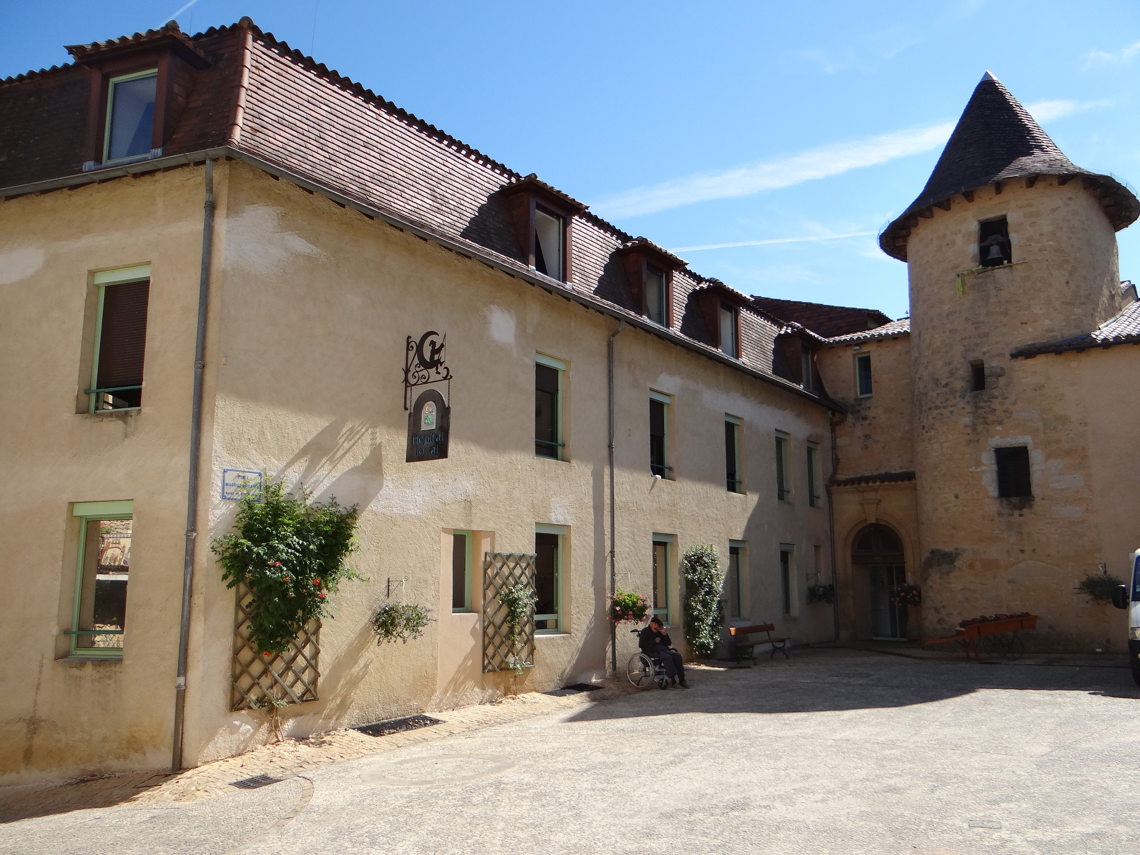 Belvès - L'hôpital local et sa tour